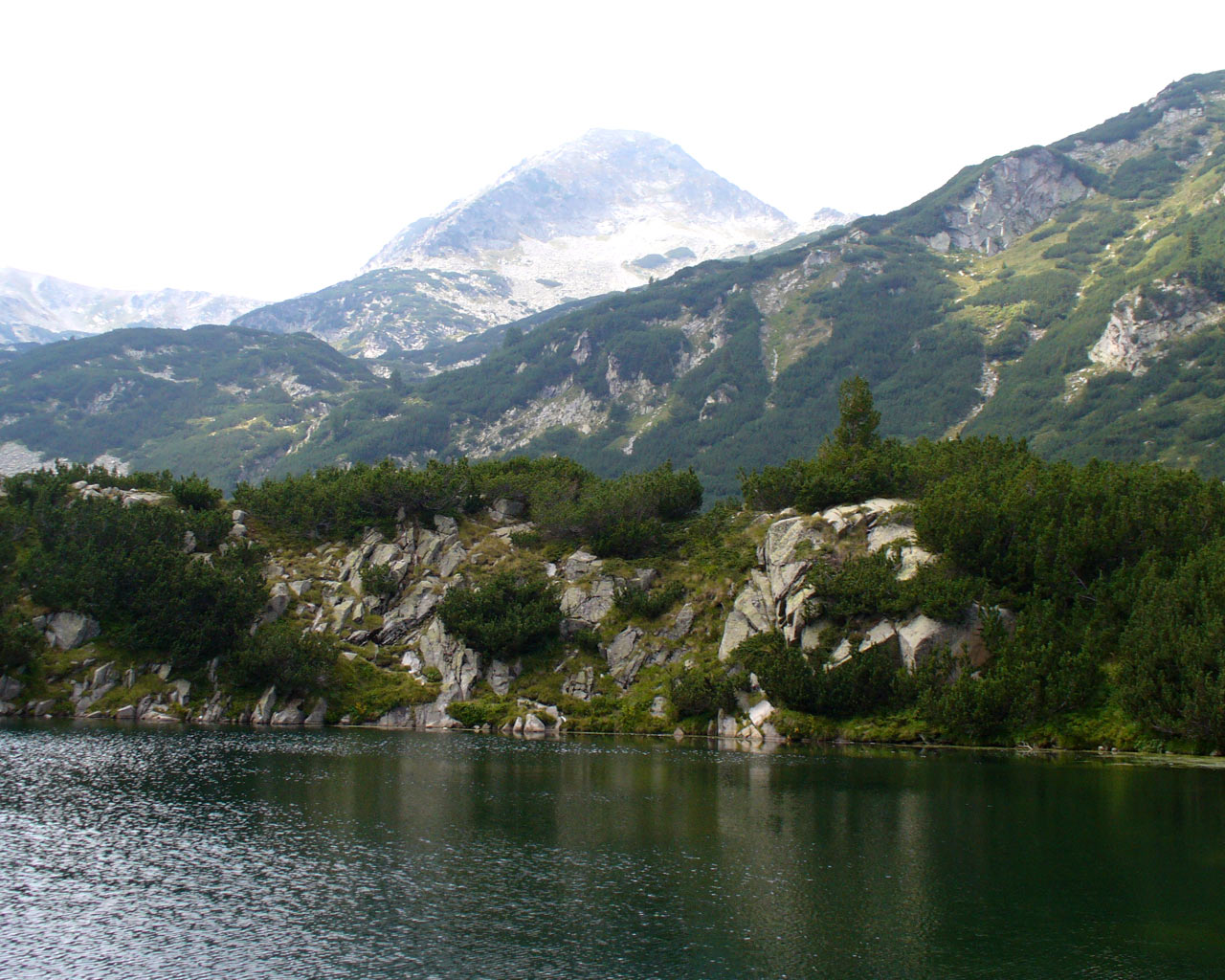 Pirin national park in Bulgaria